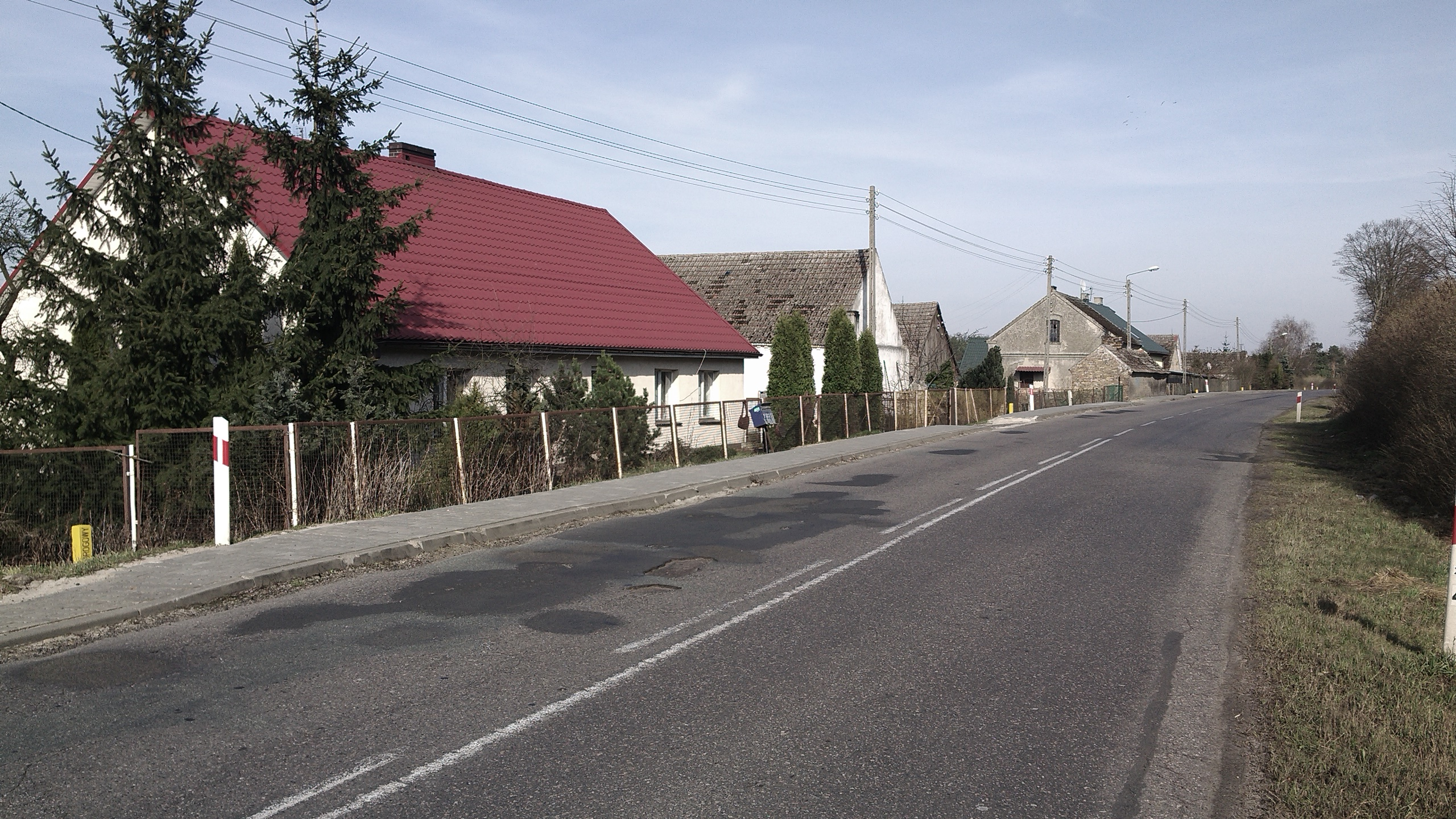 Ludzisławice gmina Santok, widok z ulicy